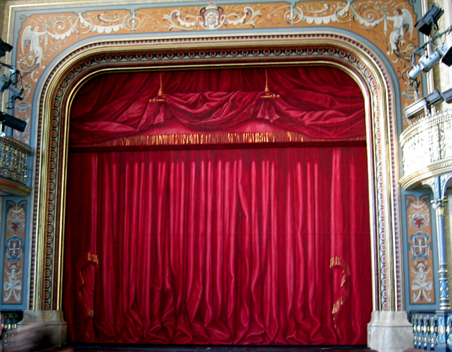 Augsburg, Germany: Parktheater Göggingen (Kurhaus), Vorhang